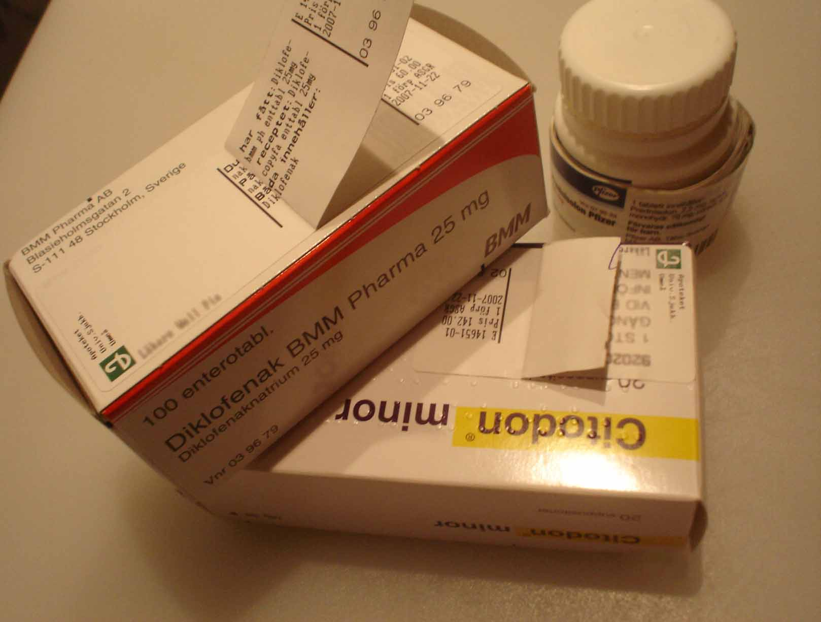 Analgetika: Diklofenak (Diclofenac), Citodon, …